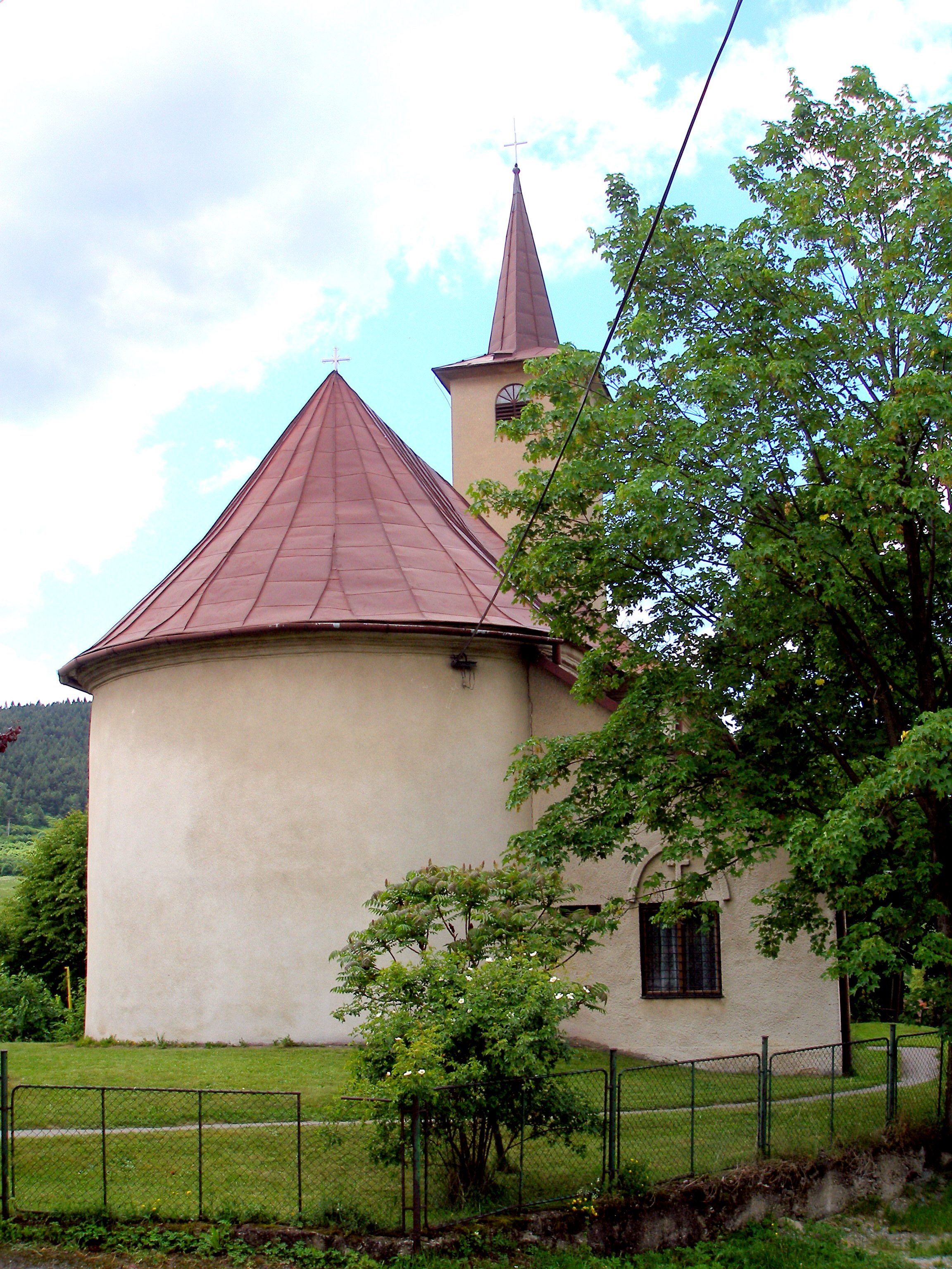 Obec Lúčka okres Sabinov